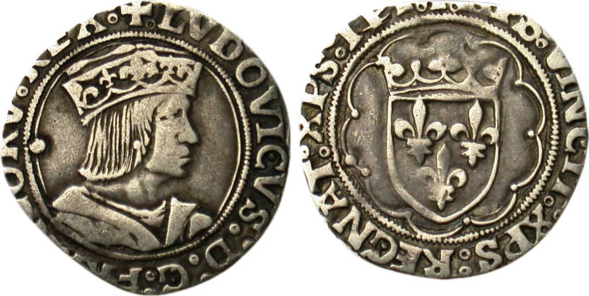 Demi-teston de Louis XIII dit le Père du peuple, 1514